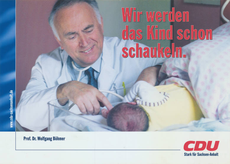 Wir werden das Kind schon schaukeln. Prof. Dr. Wolfgang Böhmer CDU Stark für Sachsen-Anhalt Abbildung: Prof. Böhmer als Arzt am Babybett Kommentar: Auf Pappe aufgezogen Plakatart: Kandidaten-/Personenplakat mit Porträt Objekt-Signatur: 10-036 : 805 Bestand: Landtagswahlplakate Sachsen-Anhalt (10-036) GliederungBestand10-18: Landtagswahlplakate Sachsen-Anhalt (10-036) » CDU Lizenz: KAS/ACDP 10-036 : 805 CC-BY-SA 3.0 DE